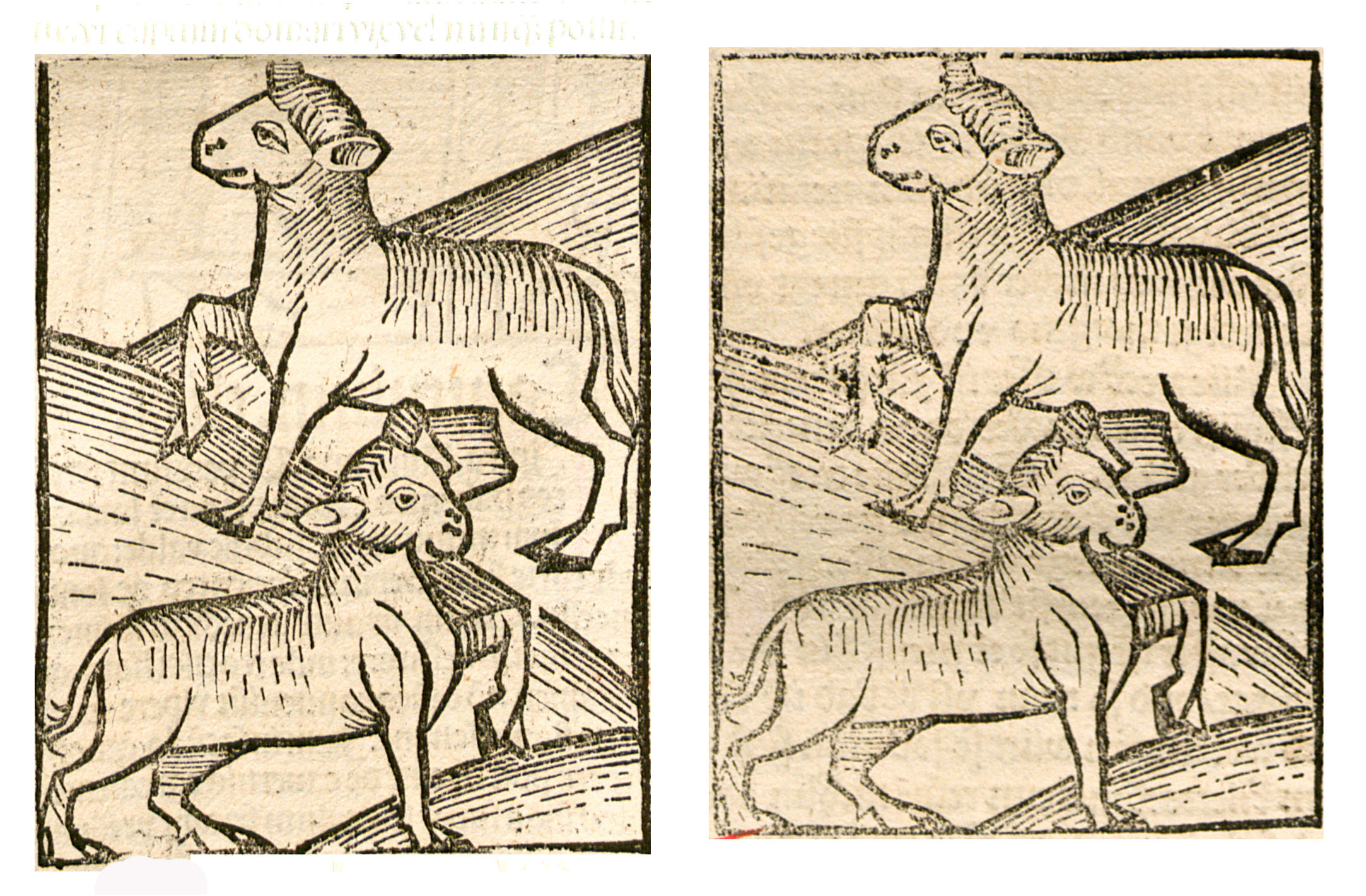 Abbildung von: Kalbs Blut